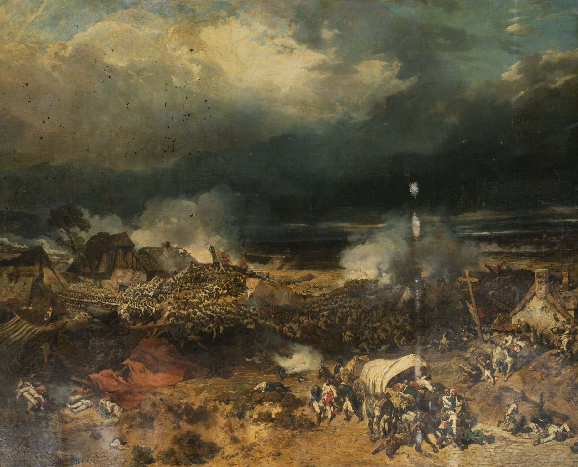 Bataille de Wattignies, 15-16 octobre 1793. L'affrontement s'achève sur une victoire de l'armée française commandée par le général Jourdan sur les forces autrichiennes du feld-maréchal de Saxe-Cobourg.